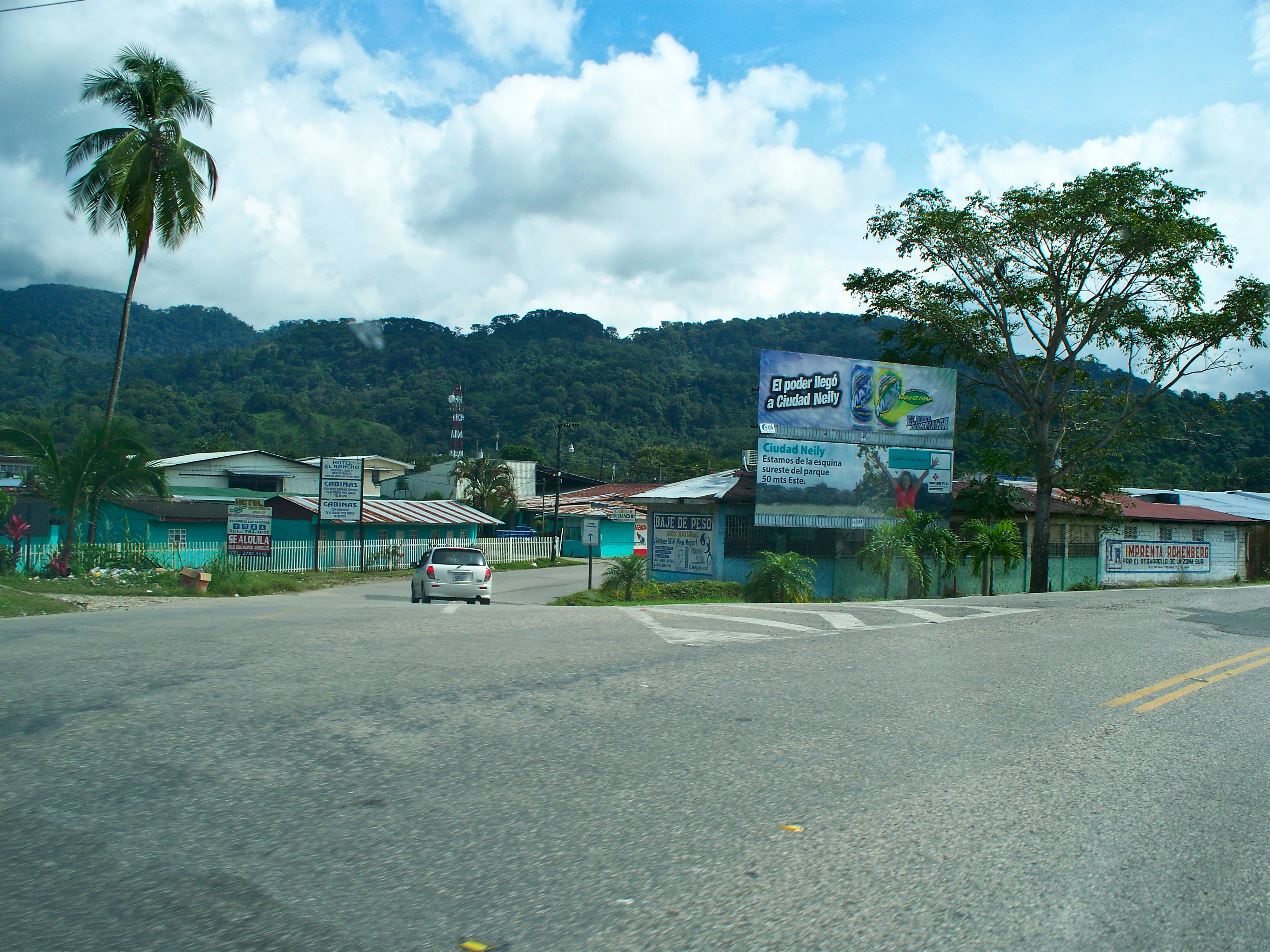 Ciudad Neily, Puntarenas, Costa Rica